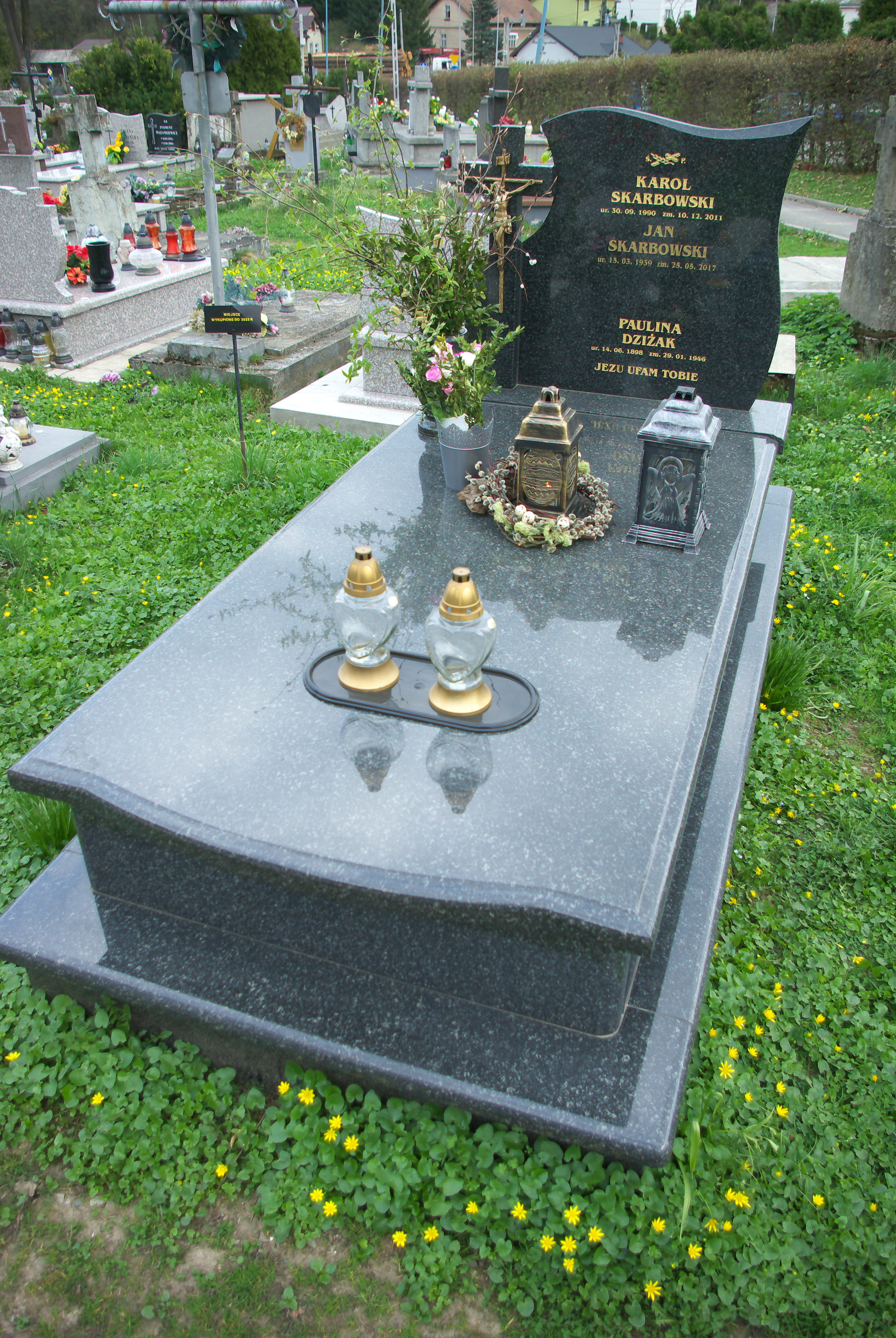 Grobowiec rodziny Skarbowskich na Cmentarzu Centralnym w Sanoku.